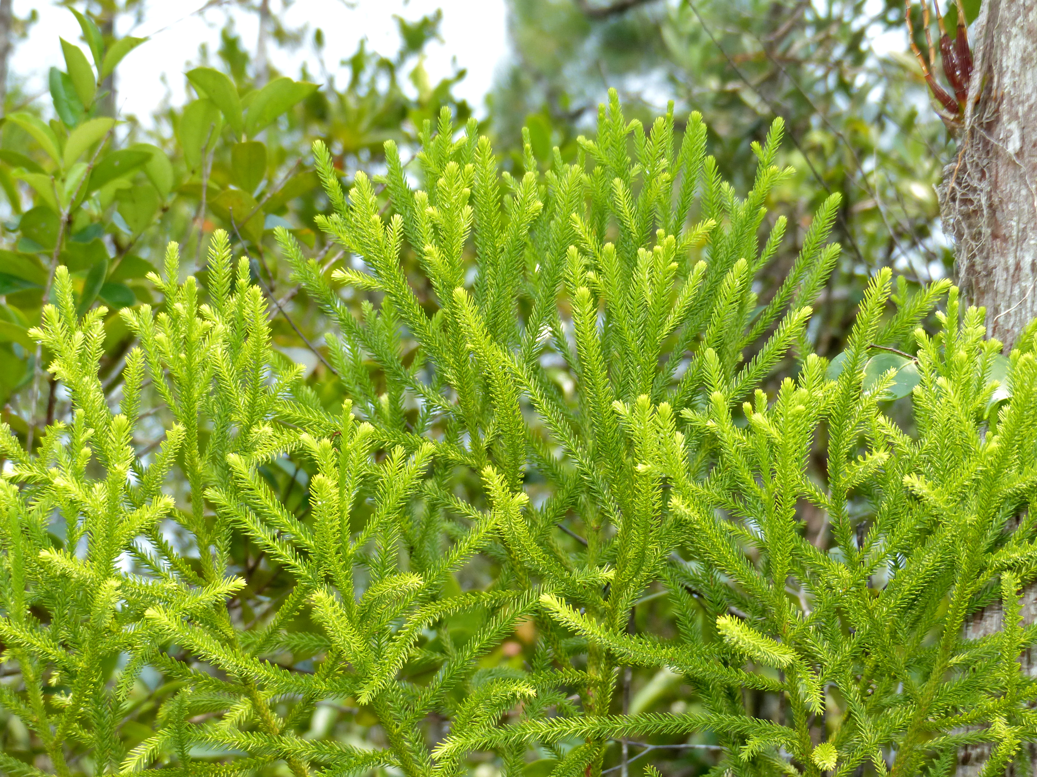 Lintang Trail, Bako NP, Sarawak, MALAYSIA